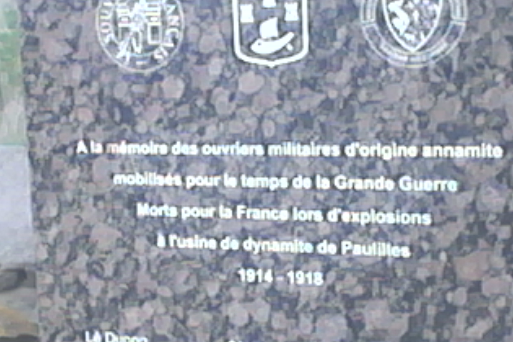 Plaque commémorative en hommage aux travailleurs annamites (Indochine française) morts à l'usine de dynamites de Paulilles (Pyrénées-Orientales) durant la première guerre mondiale. « A la mémoire des ouvriers militaires d'origine annamite mobilisés pour le temps de la Grande Guerre. Morts pour la France lors d'explosions à l'usine de dynamite de Paulilles. 1914-1918 »